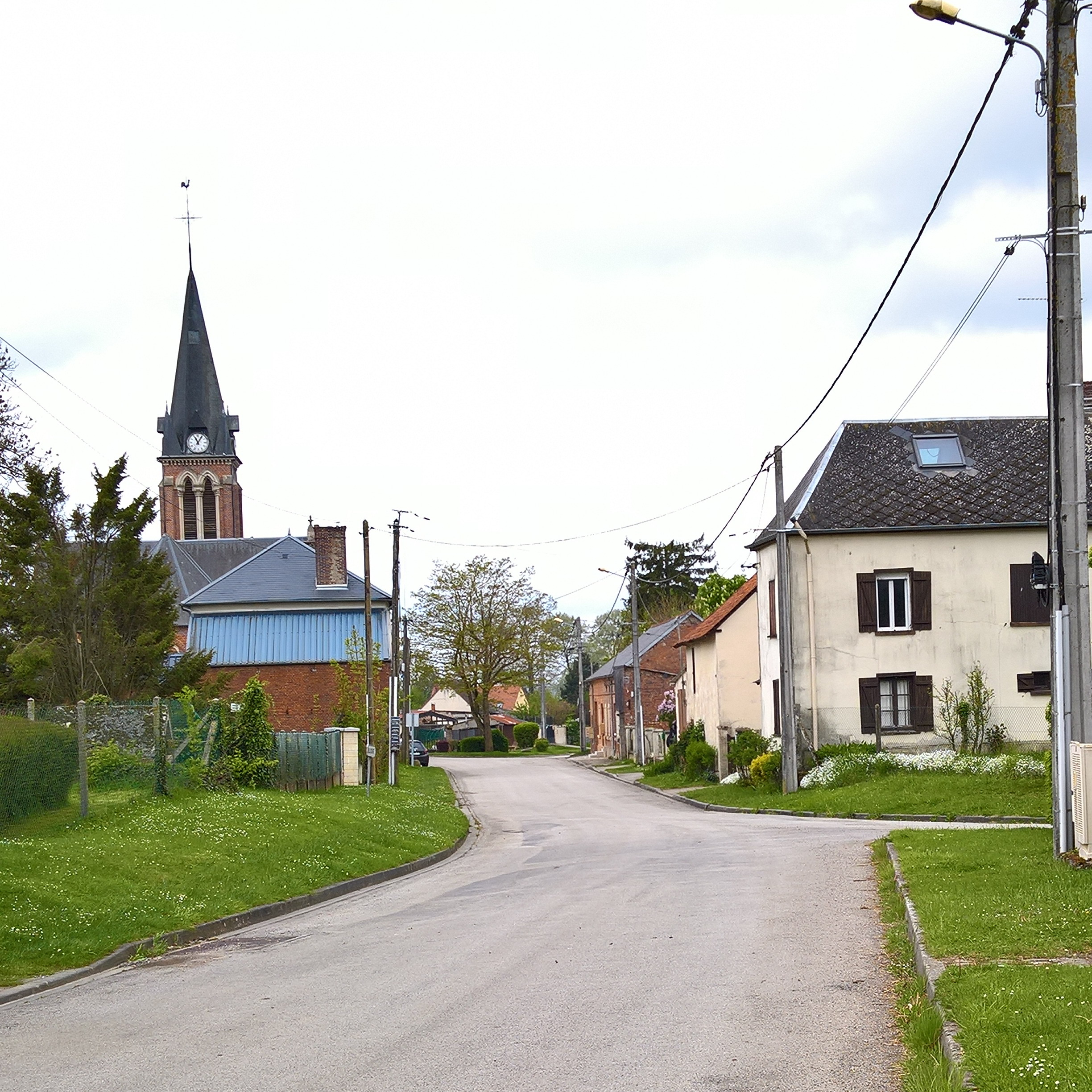 Rotangy : Paysage urbain, rue de l'Argillière